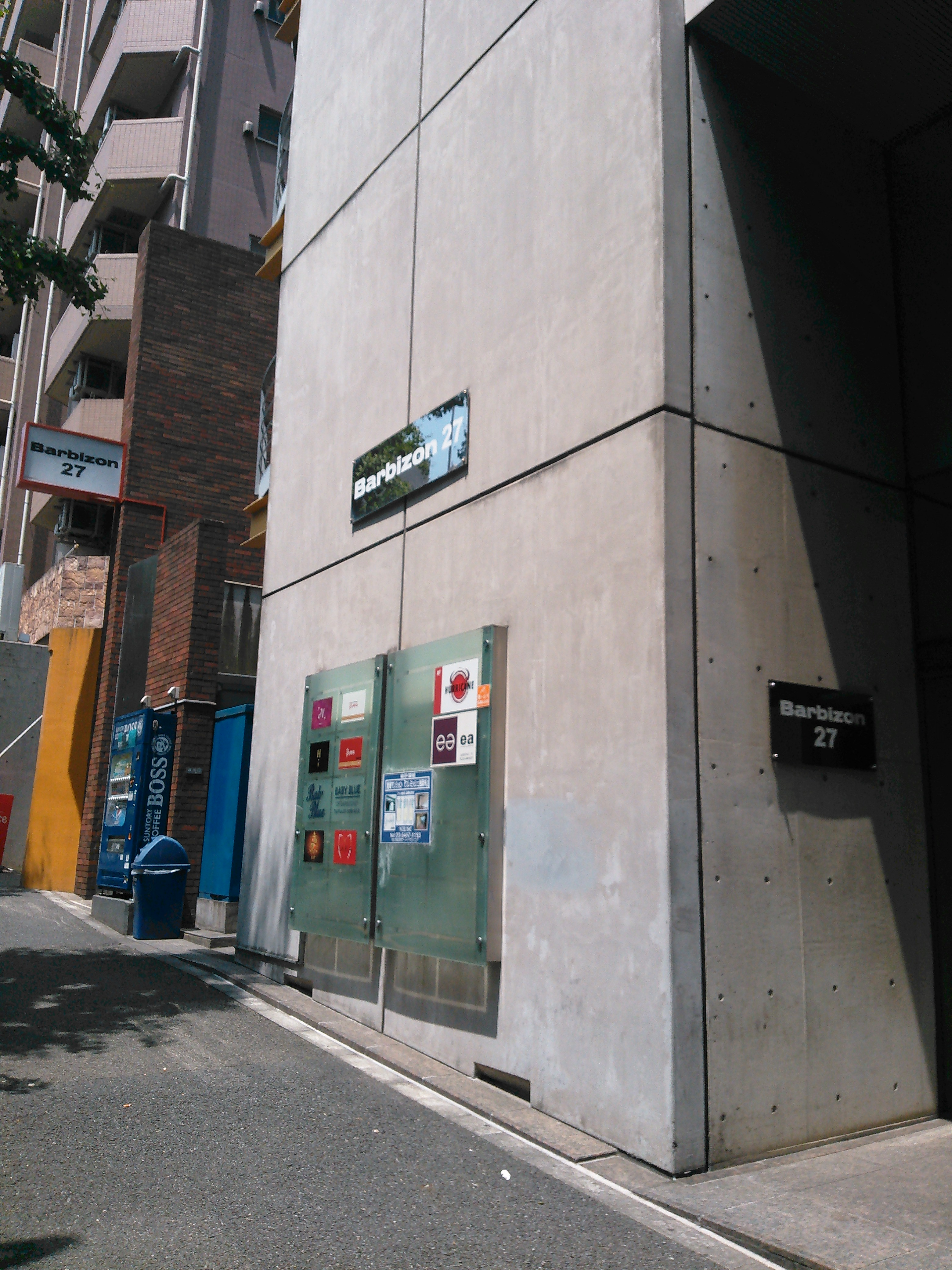 東京・西麻布の雑居ビル、バルビゾン27